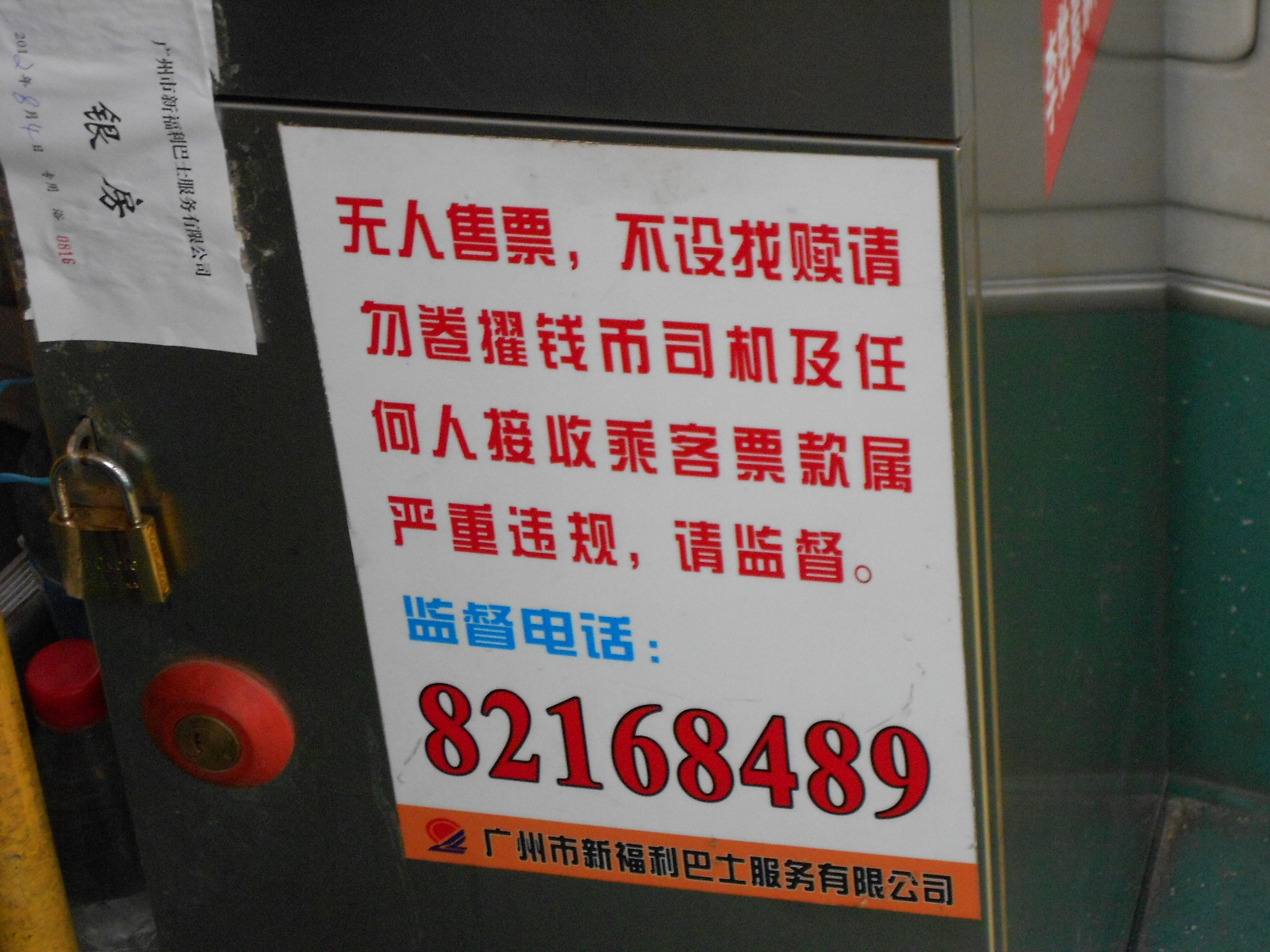 車廂內的廣州市新福利巴士服務有限公司的商標已被改為廣州市第二公共汽車公司的商標。車廂外被改為第二巴士的商標（冠忠）。